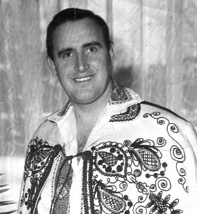 Interpretul Dumitru Sopon